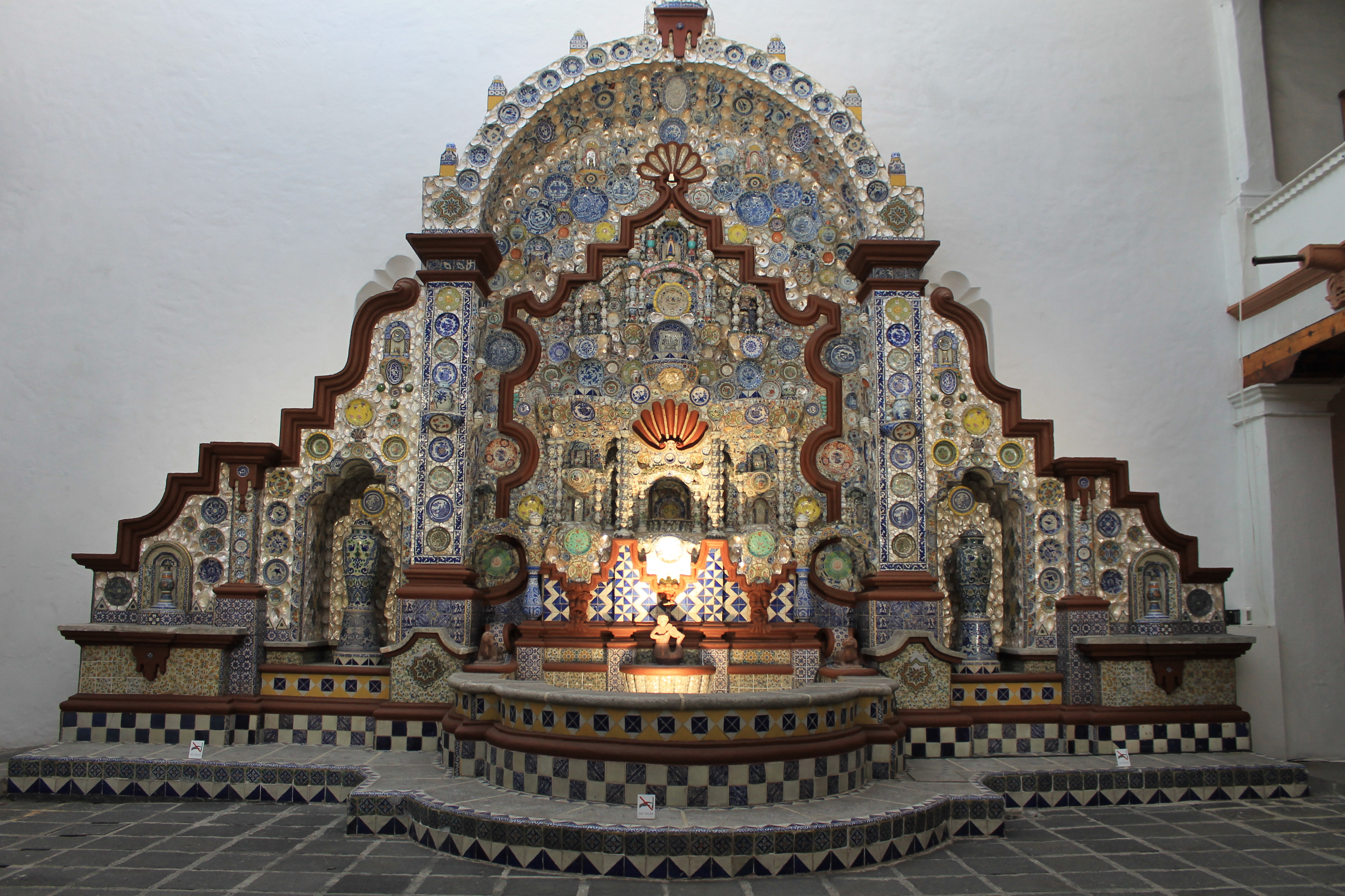 Fuente construida en el siglo XVIII localizada en el Museo Casa del Risco, San Ángel, México, Distrito Federal. Representa el estilo barroco en el México Virreinal y esta construida con materiales como platos, tazas, porcelana, espejos y concha nácar.